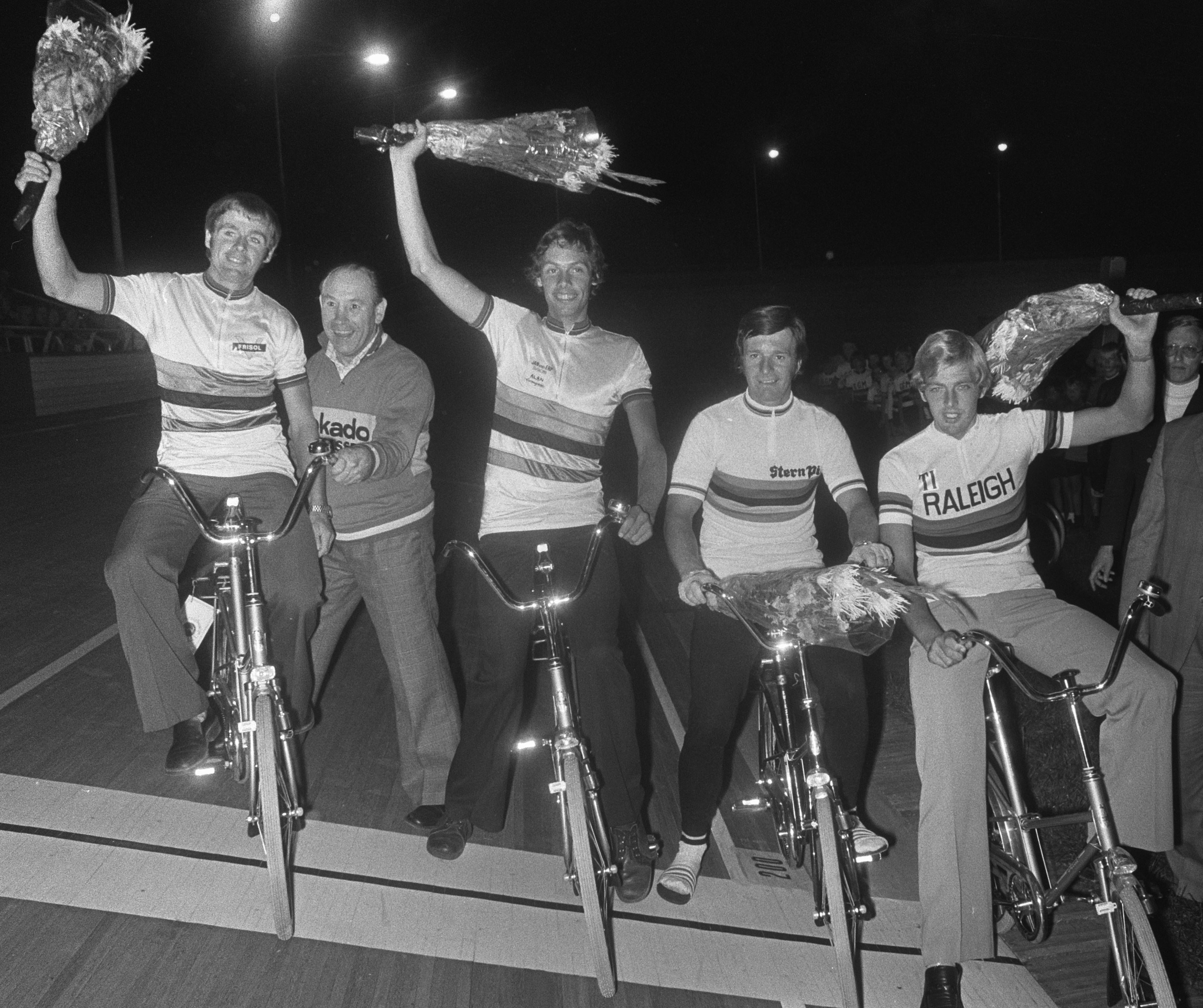 Huldiging wereldkampioenen wielrennen op wielerbaan Sloten v.l.n.r. Hennie Kuiper , Andre Gevers , Dieter Kemper (West-Duitsland) en Roy Schuiten